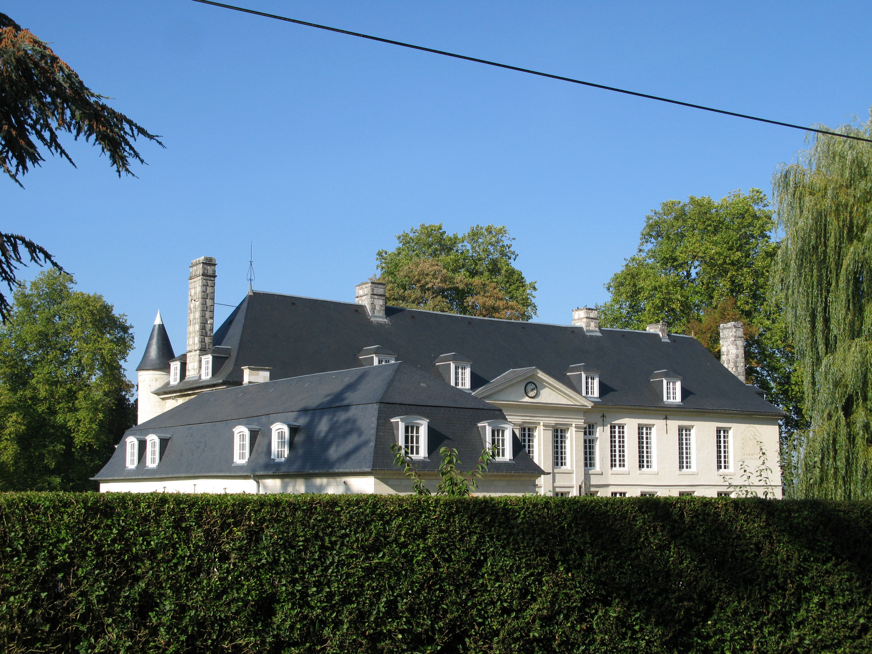 Villers-Hélon (Aisne, France) - La façade du château aperçue par-dessus la haute haie. . .